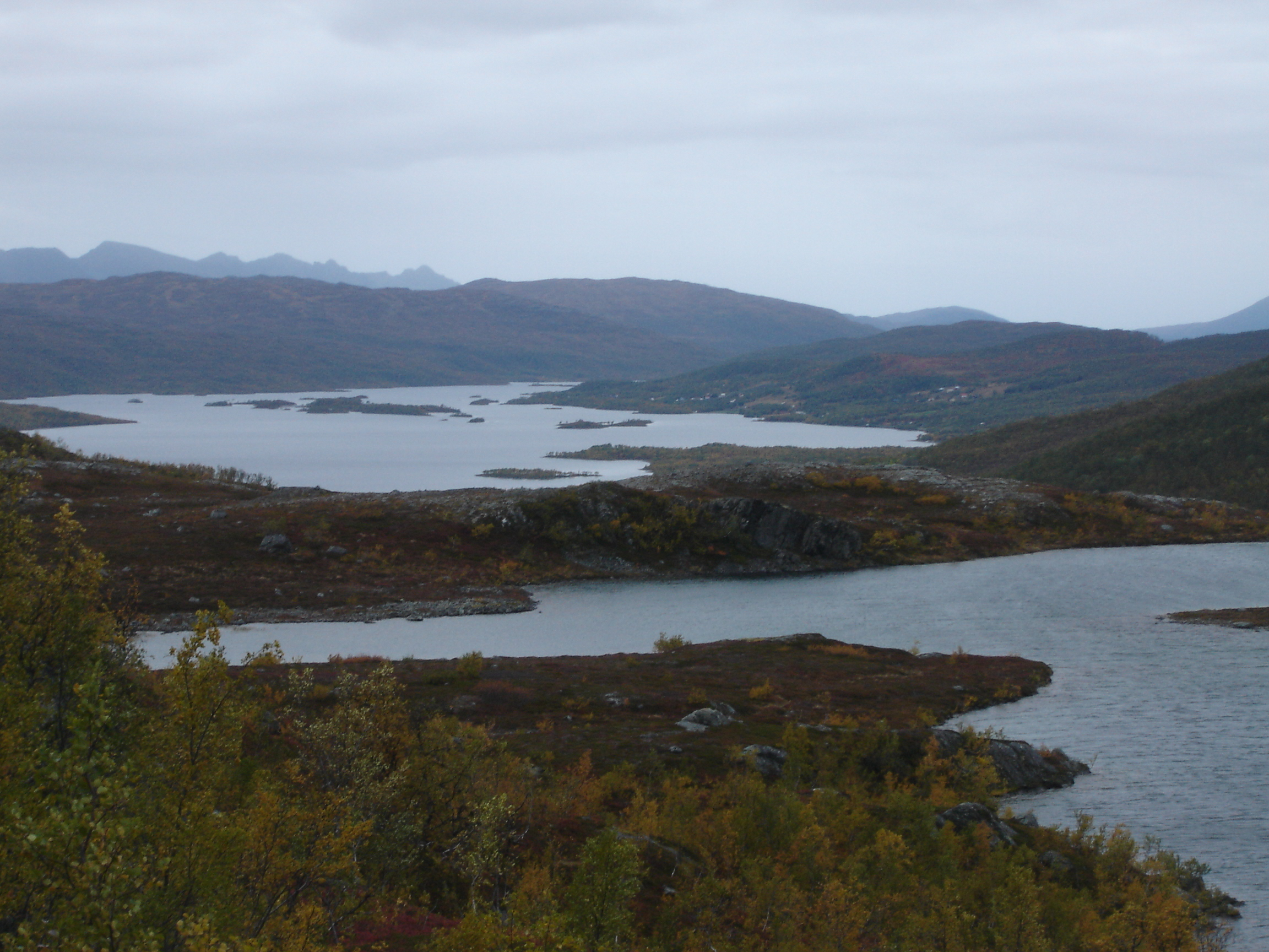 Skogsfjordvatn from Fiskelausvatnet